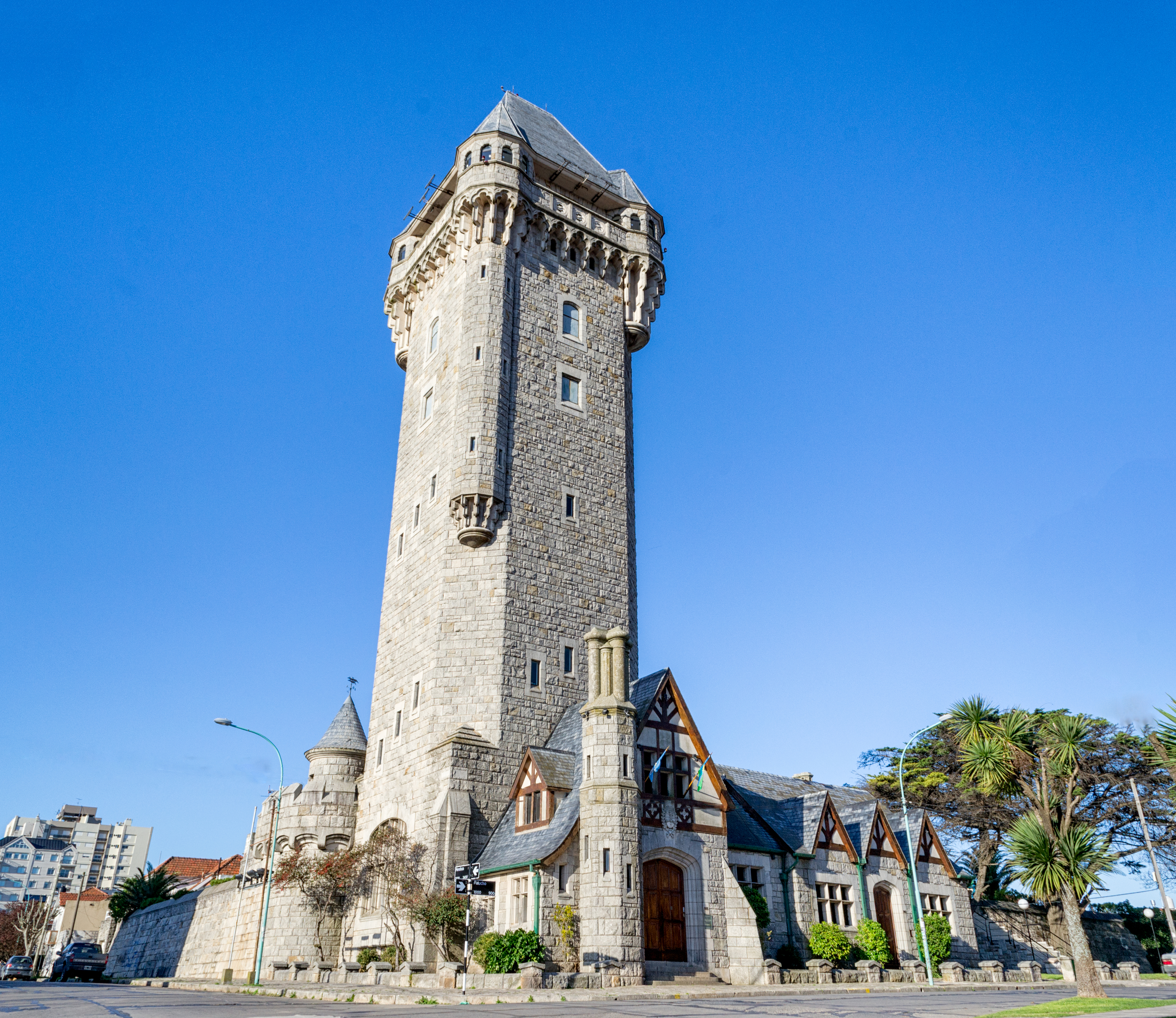 Torre Tanque de Obras Sanitarias de la Nación. Ciudad de Mar del Plata, Provincia de Buenos Aires, Argentina.